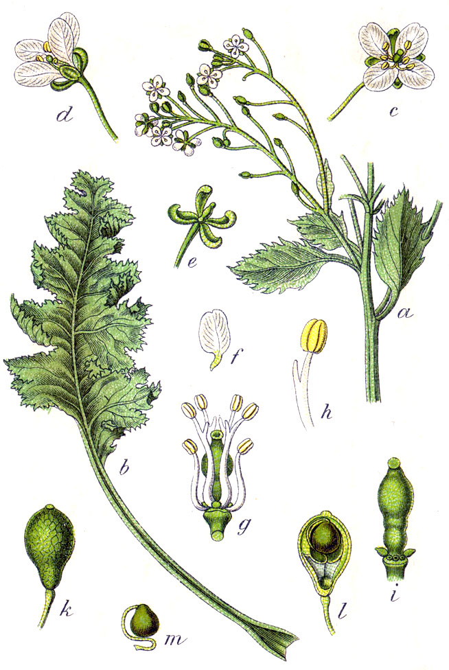 Crambe maritima L., syn. Crucifera maritima (L.) E.H.L.Krause Original Description "Meerkohl", Crucifera maritima